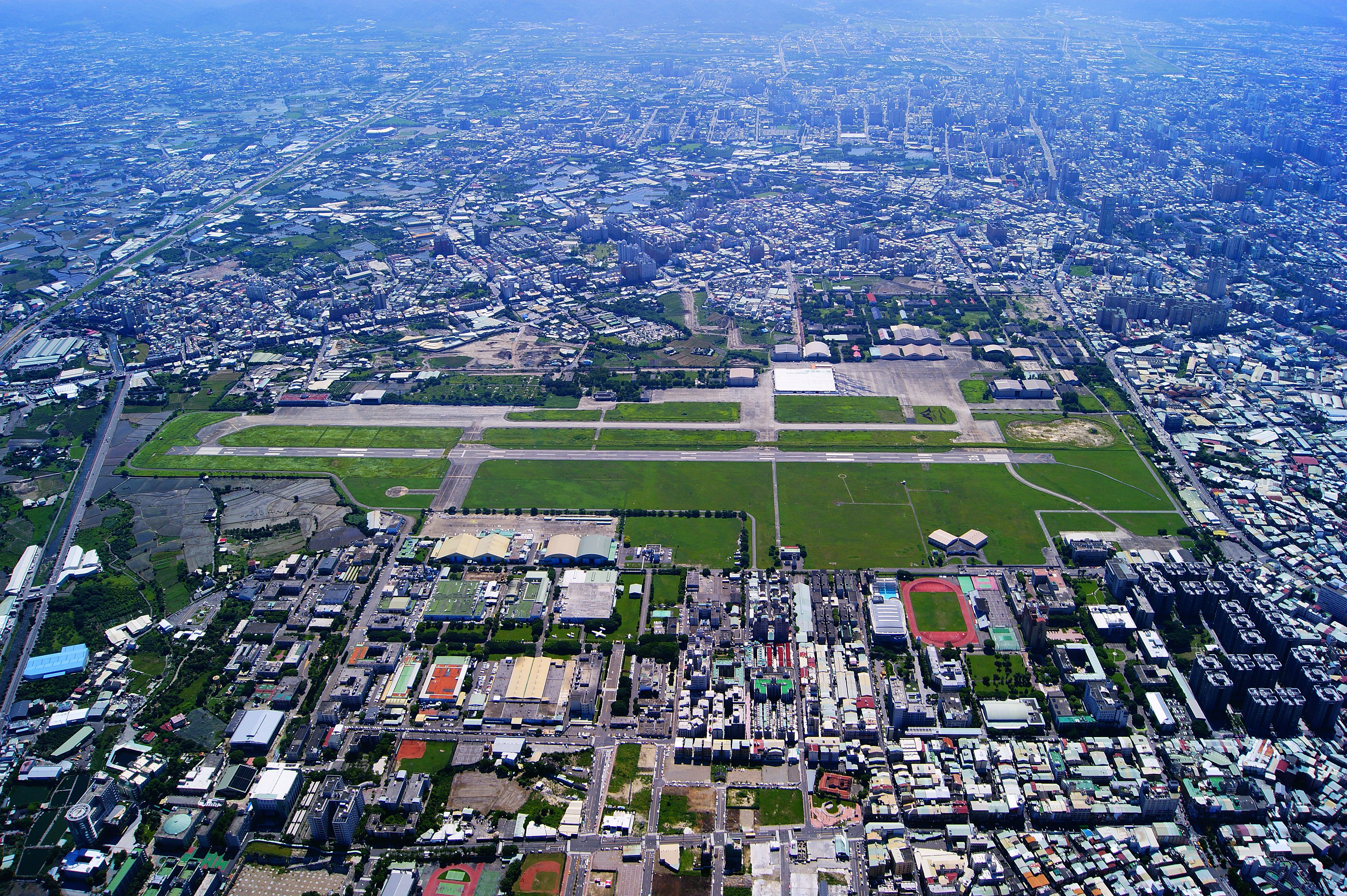 中文（台灣）: 水湳經貿園區（原臺中水湳機場）鳥瞰。